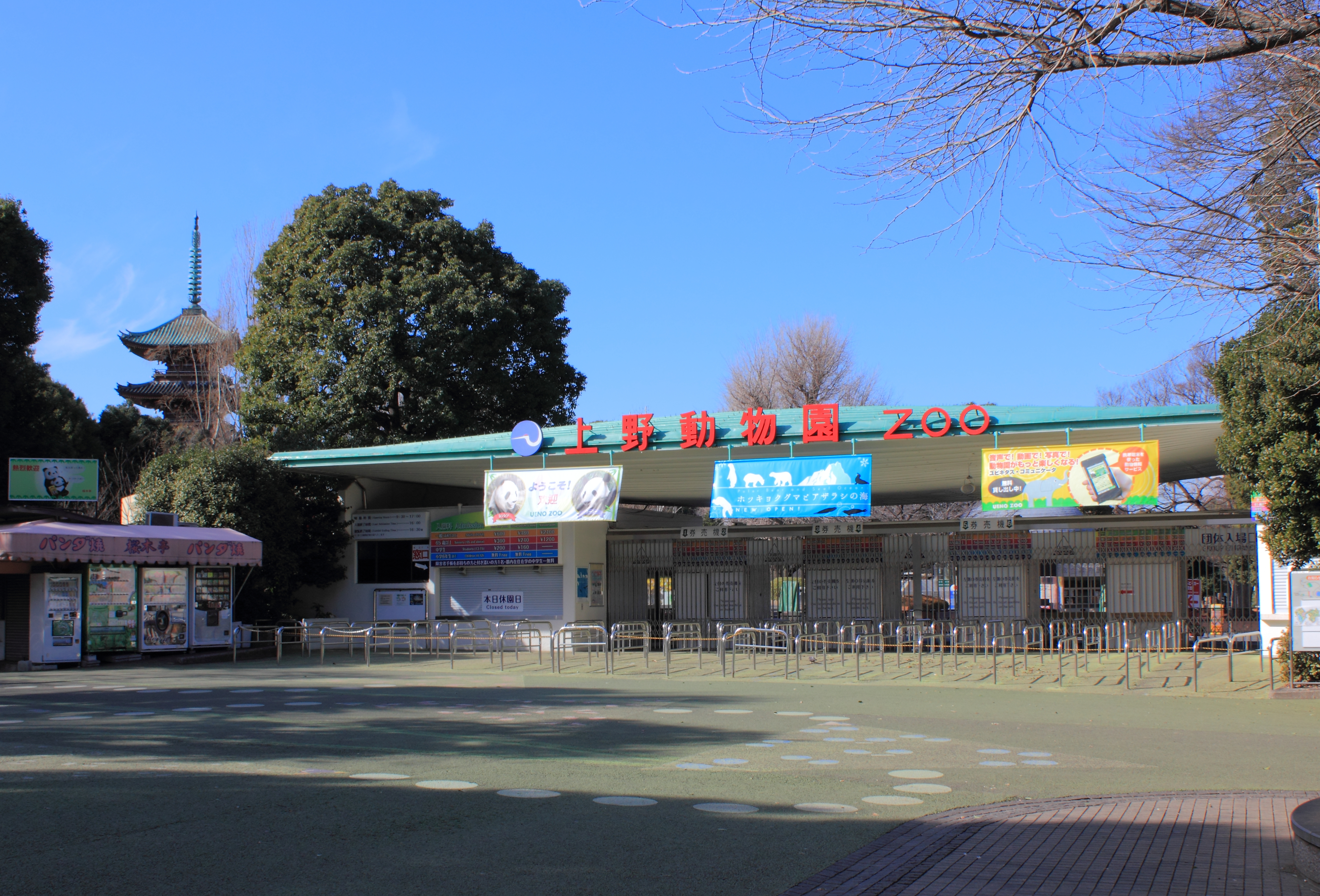 上野動物園（東京都台東区）